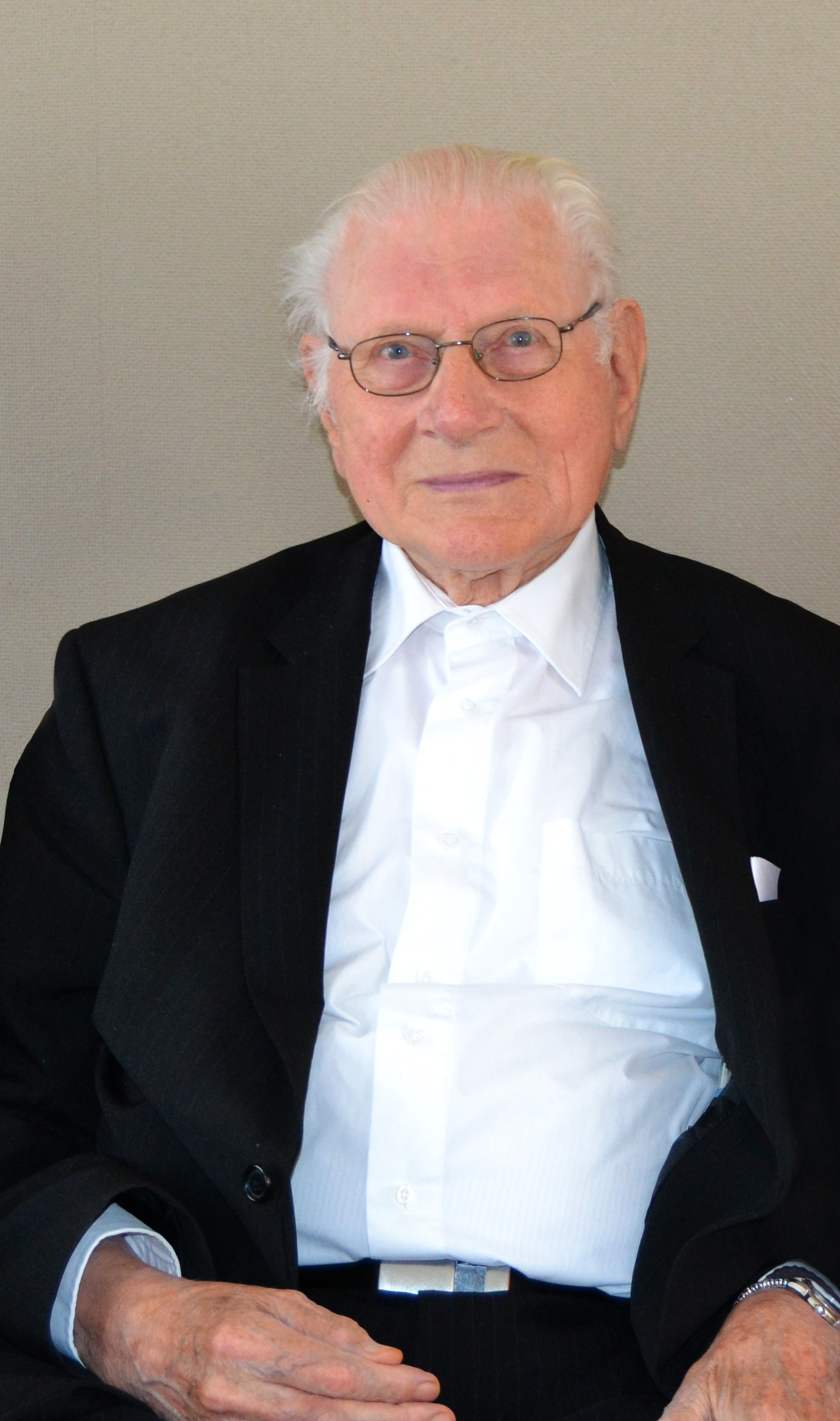 Professor P.C. Paardekooper